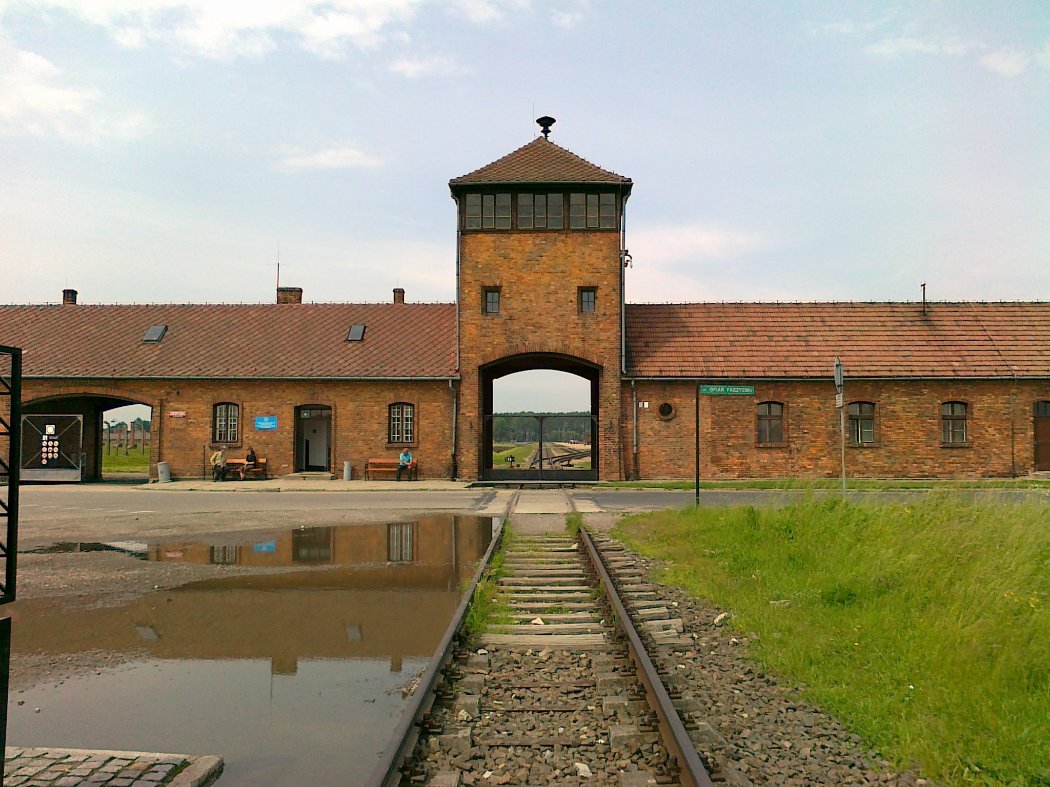 Birkenau múzeum